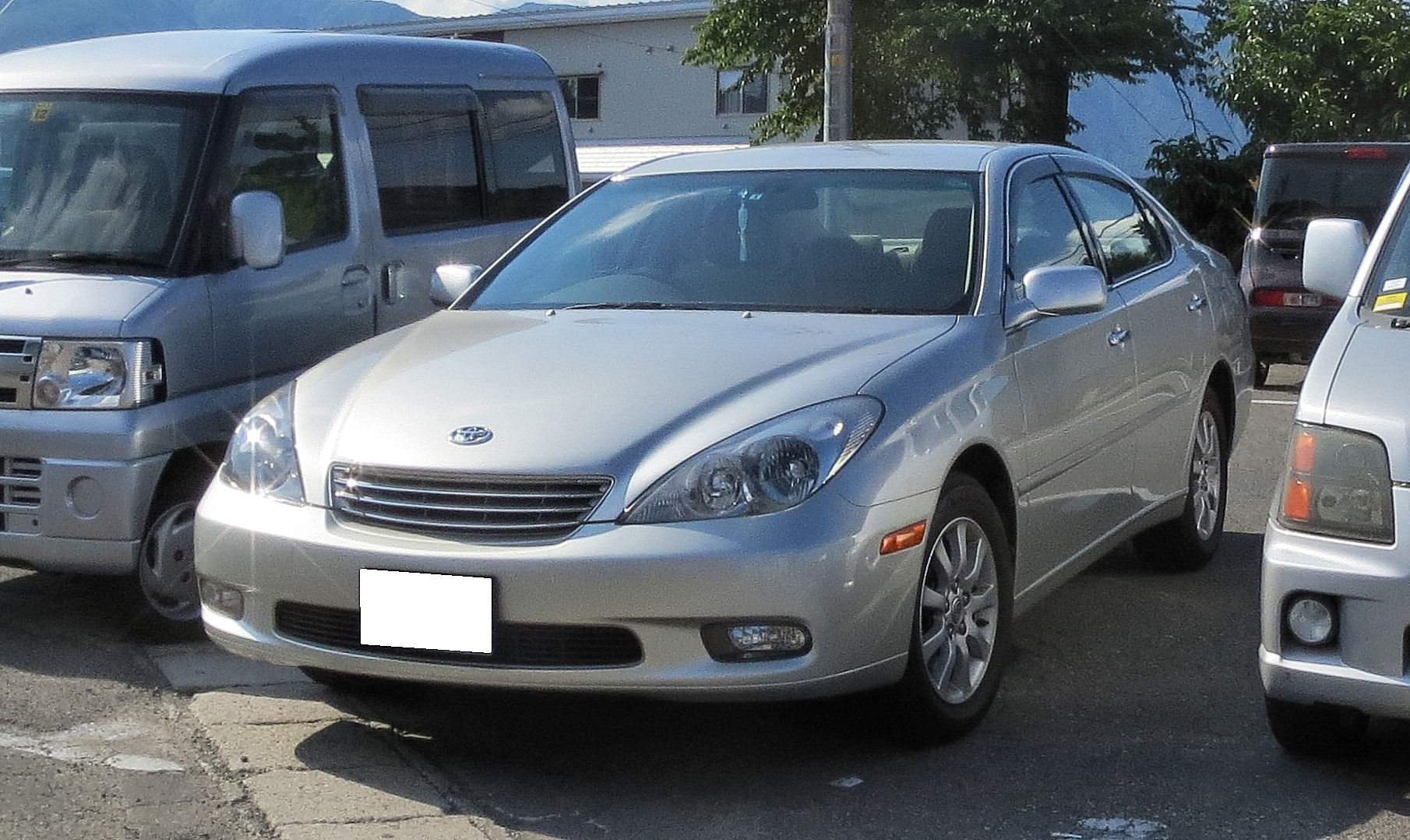 3代目 トヨタウインダム 3.0G(前期型)